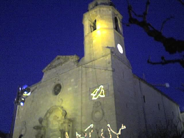 església del Palau d'Anglesola